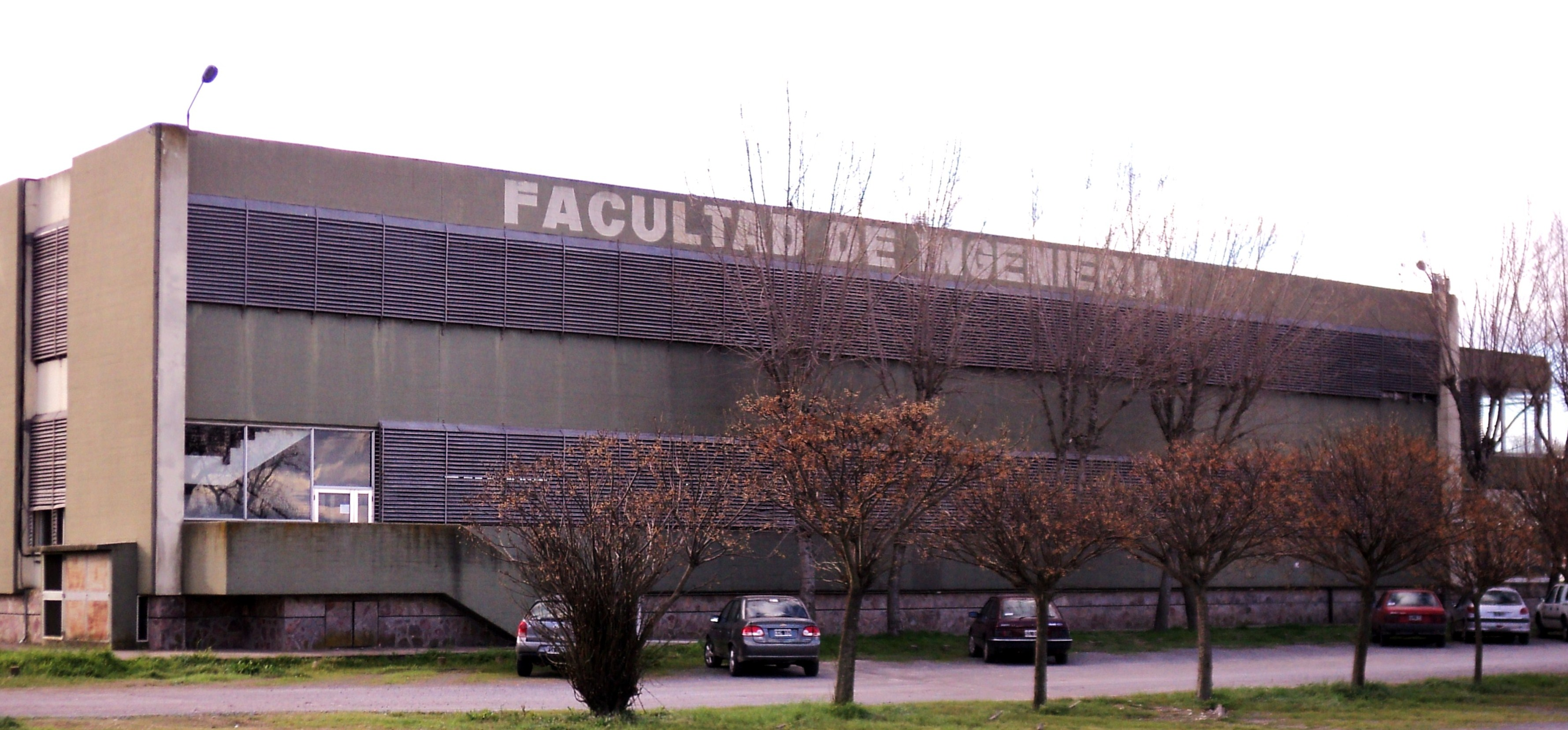 la facultad de ingienieria junto a la de sociales en el campus